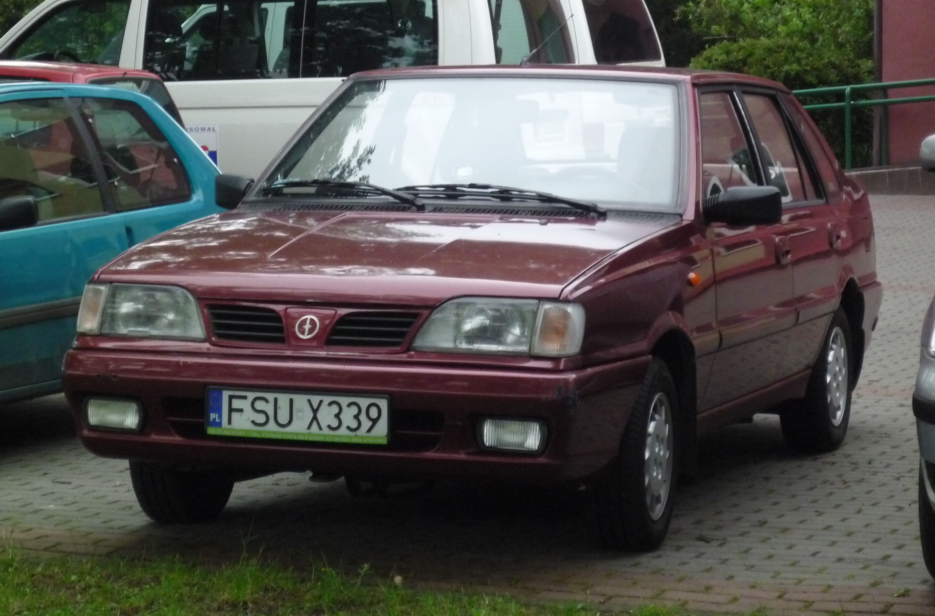 Daewoo-FSO Polonez Atu Plus 1.6 GSI w Słubicach.